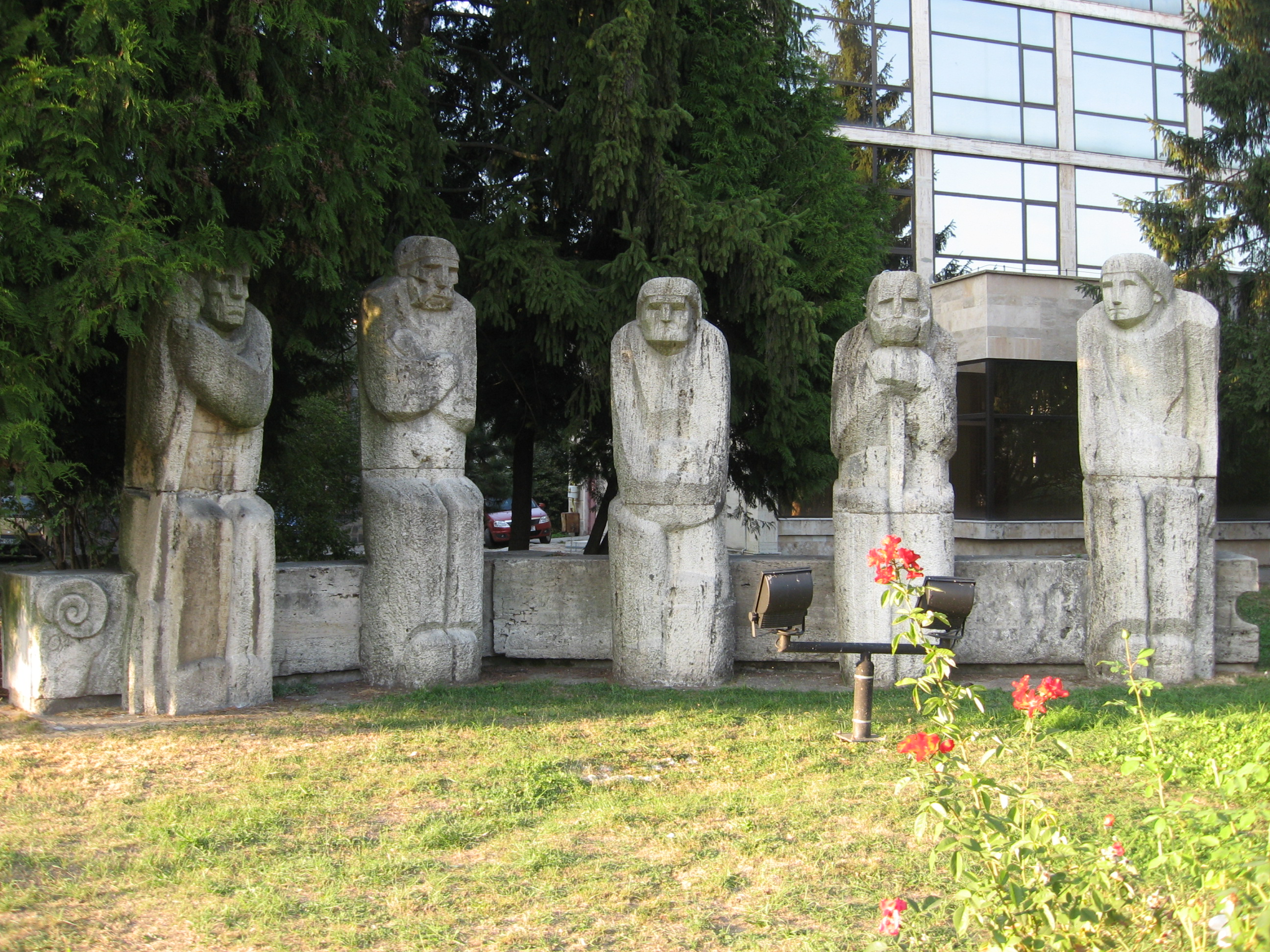 Aceasta este o imagine cu un monument istoric din Romania clasificat cu numarul MM-III-m-A-04806.